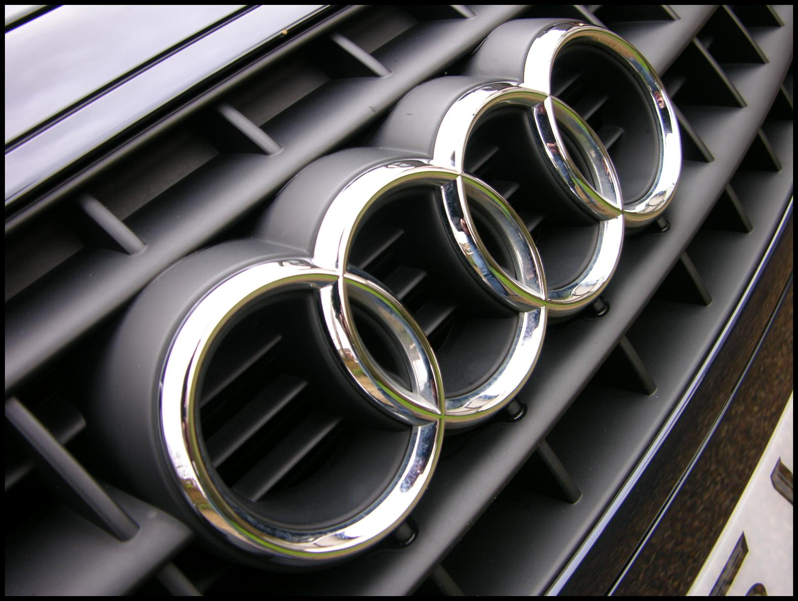 Audi TT 3.2 Roadster